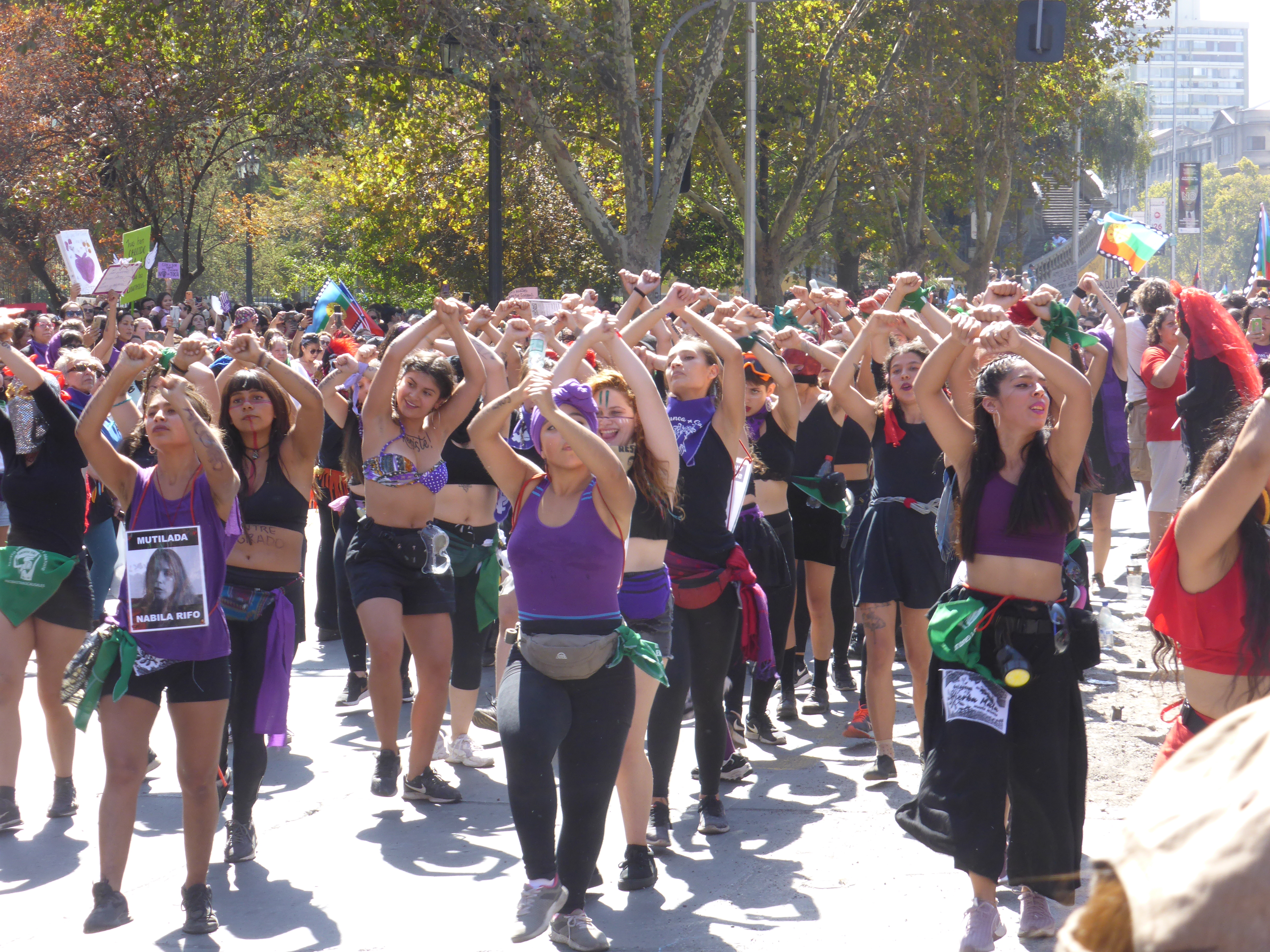 Marcha feminista en el Día Internacional de la Mujer, 8M (8 de marzo de 2020).